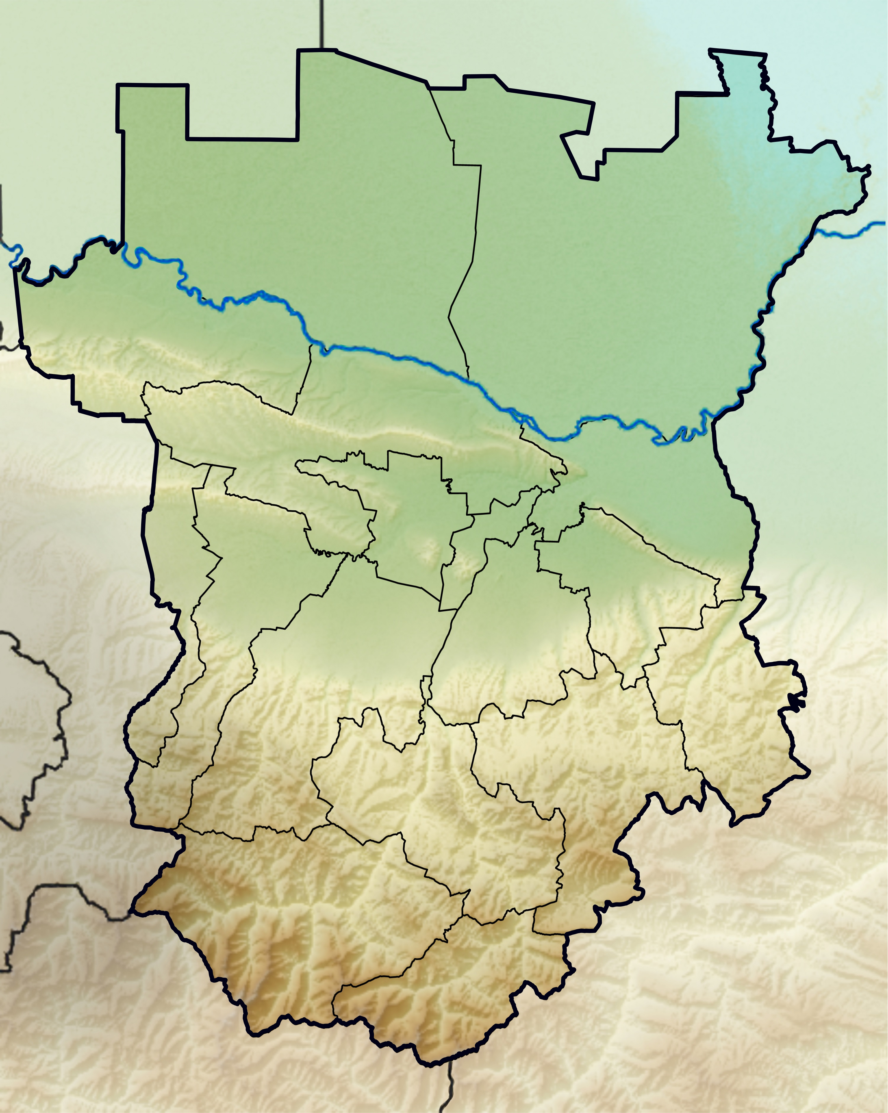 Позиционная карта Чеченской РеспубликиРавноугольная проекция, растяжение - 140%. Координаты краёв: север - 44.1° С юг - 42.4° С запад - 44.8° В восток - 46.7° В